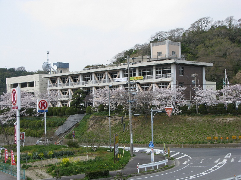 愛知県知多郡南知多町役場